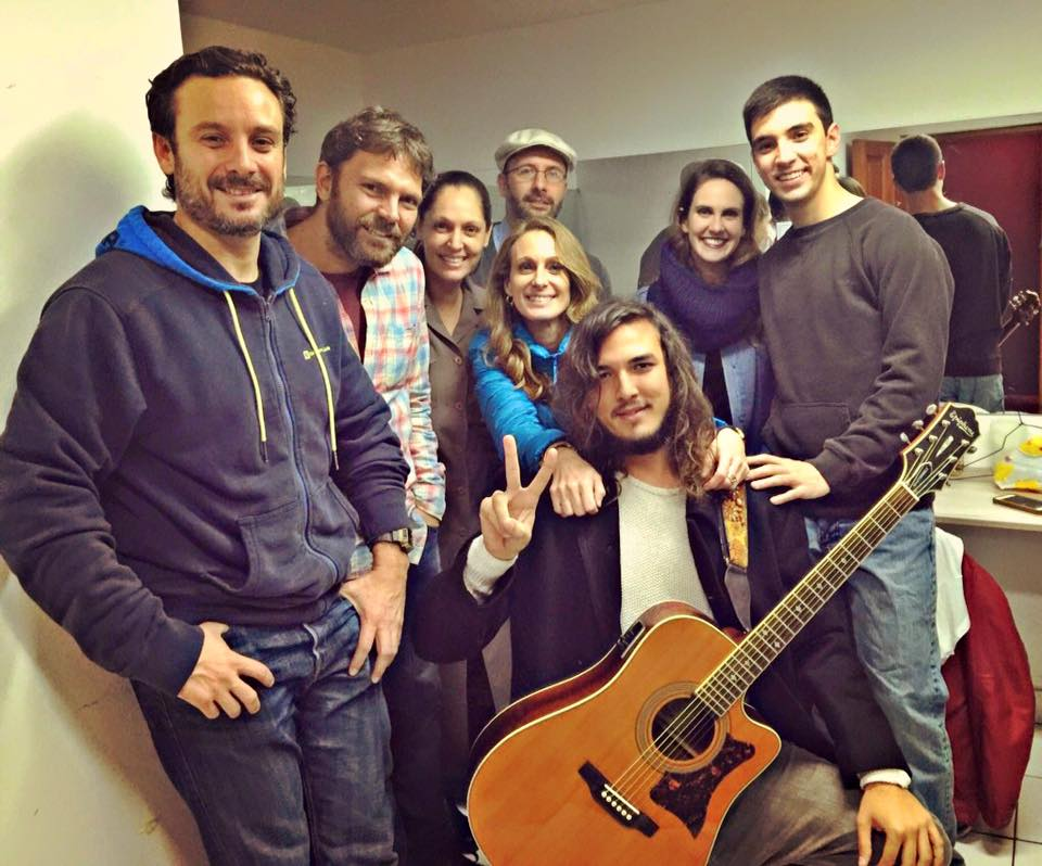 Elenco de la obra Mujeros 3 (De izquierda a derecha: Tarik D'Onofrio, Diego Lombardi, Lisette Gutierrez, Marco Zunino, [Denisse Dibos , Gonzalo Calmet, Emilia Drago, Nicolás Vilallonga